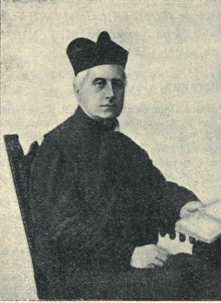 Timoteo Bertelli (Bologna, 26 ottobre 1826 – Firenze, 6 febbraio 1905)